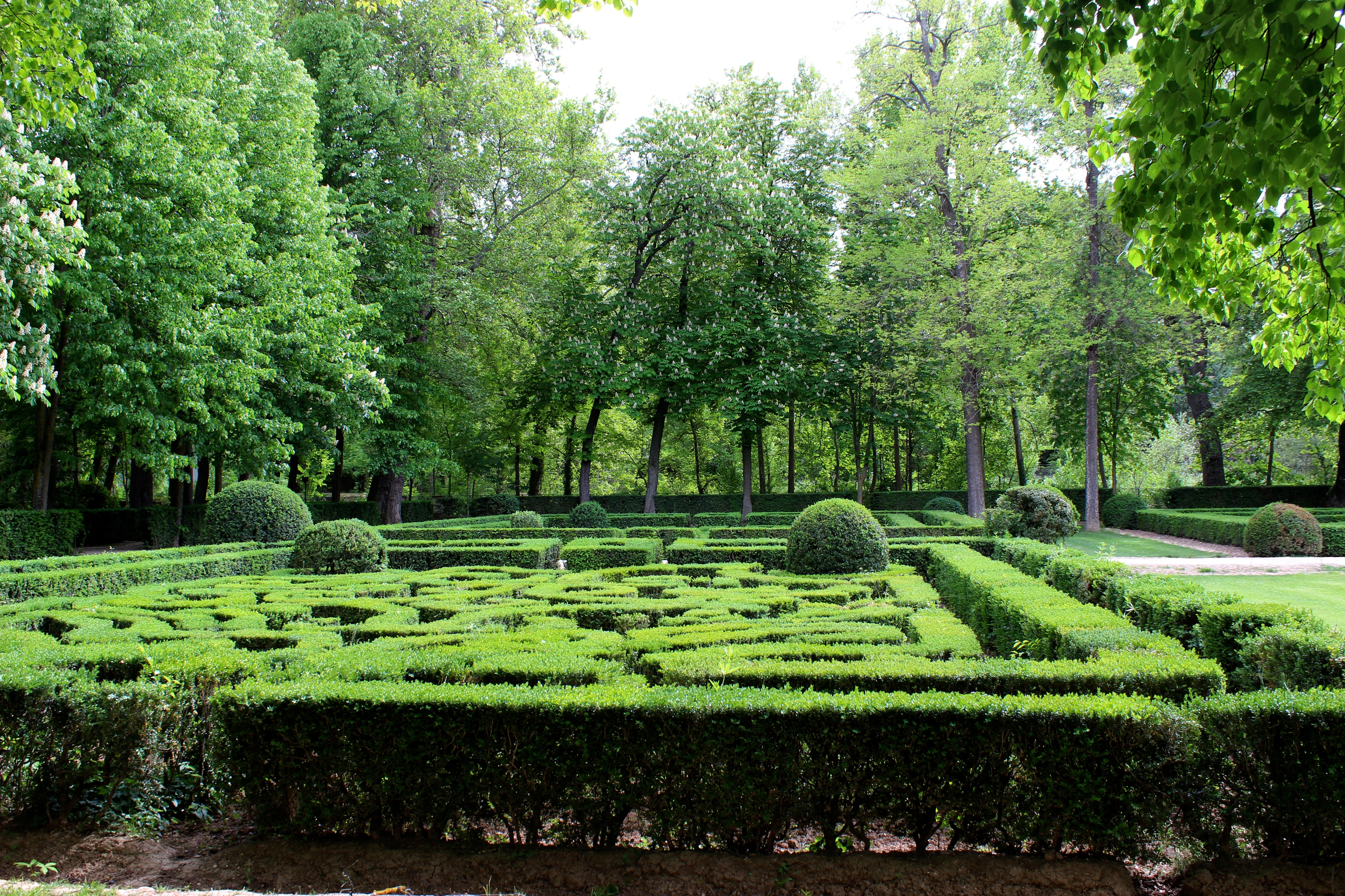 Aranjuez. Jardín de la Isla.